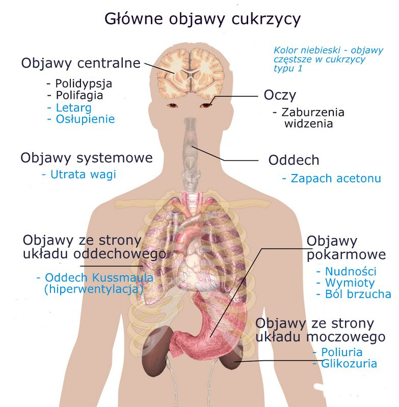 Główne objawy cukrzycy